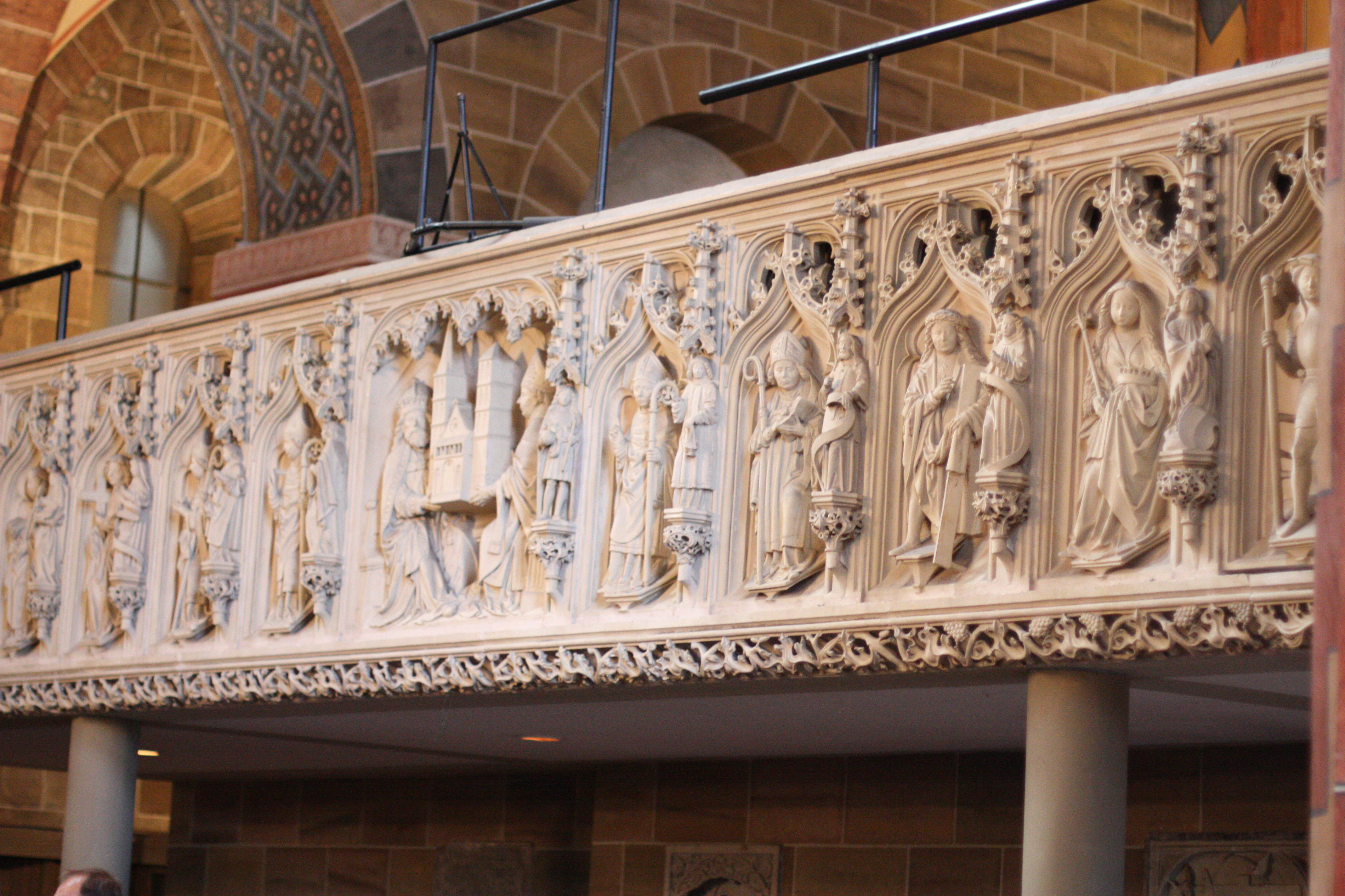 Bremer Dom